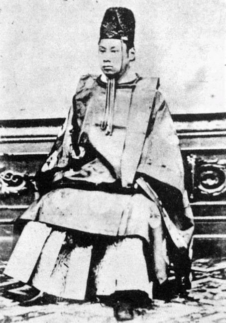 a Japanese man 有栖川宮熾仁 (Taruhito Arisugawanomiya)